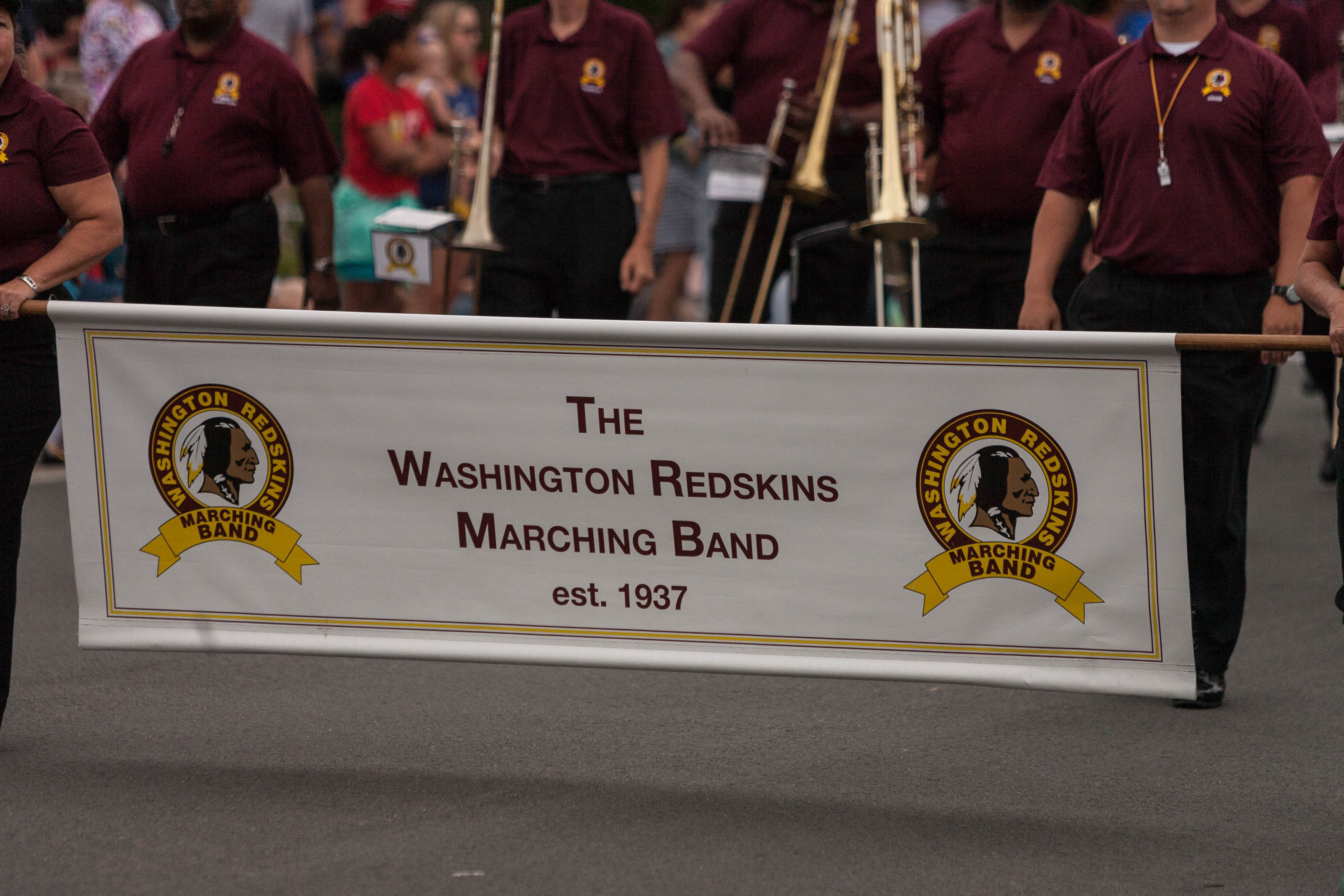 QD3J0123.jpg